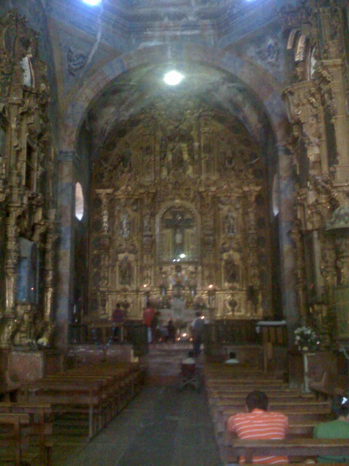 Retablo Iglesia Santuario Hgo